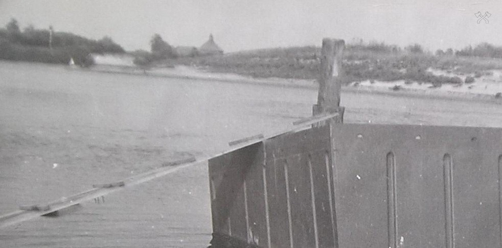 Скёрен